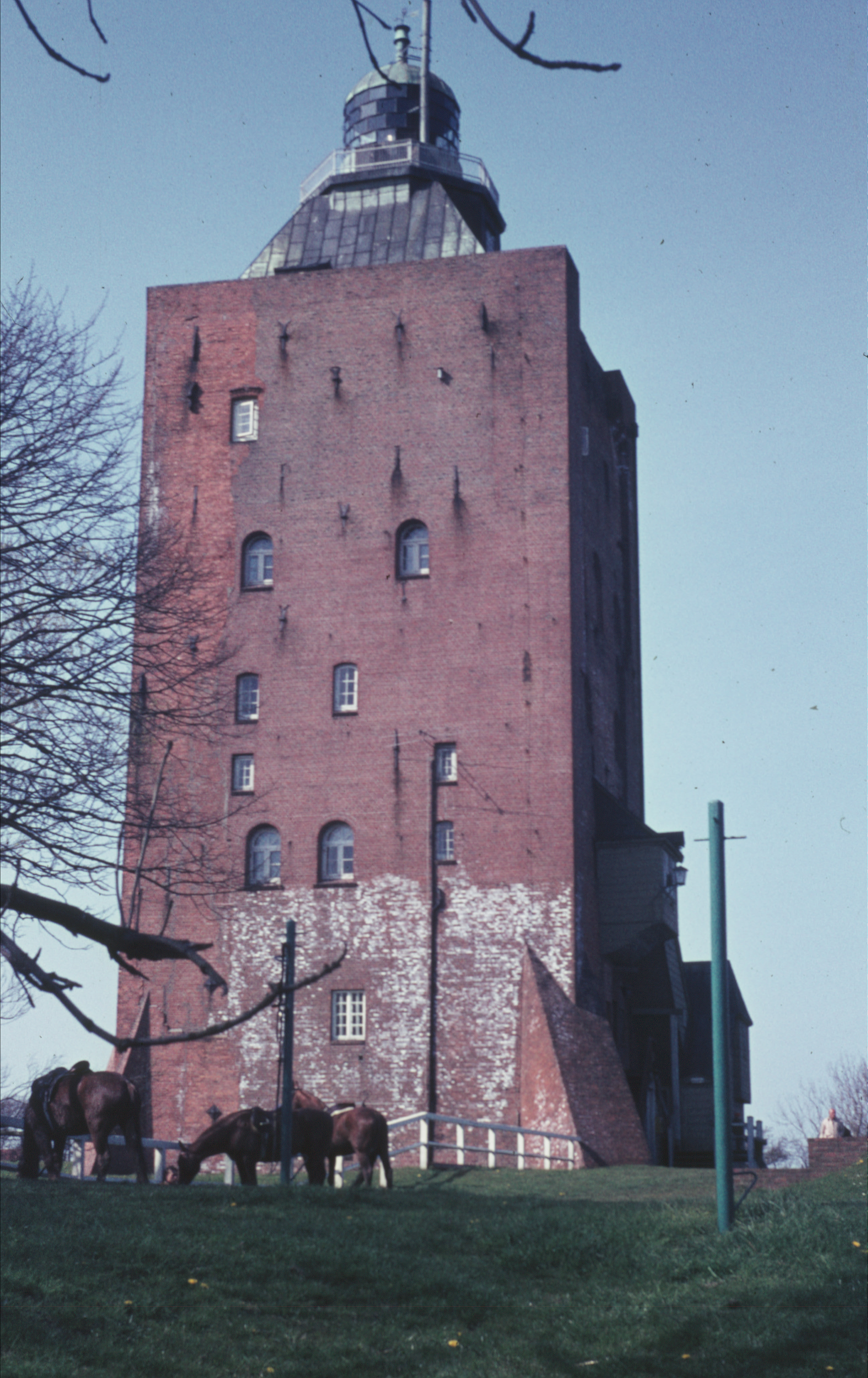 Leuchtturm auf der Insel Neuwerk.This is a photograph of an architectural monument.